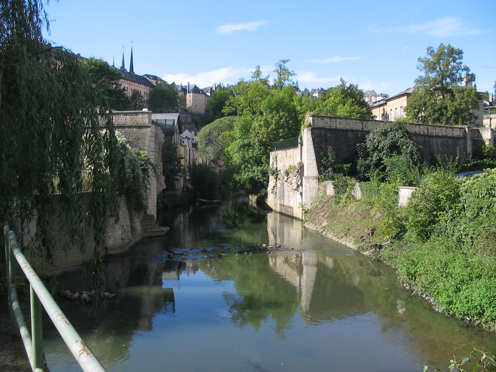 Die Alzette in Luxemburg (Stadt), an der Mündung der Pétrusse.